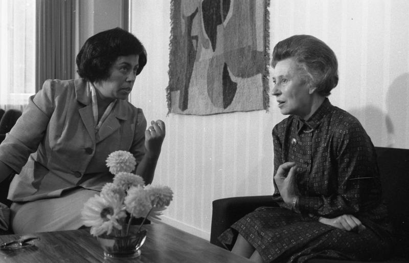 Sozialministerin v. Ägypten, Frau Dr. Abu Zeid links bei Frau Gesundheitsministerin Schwarzhaupt rechts in Bonn-Godesberg